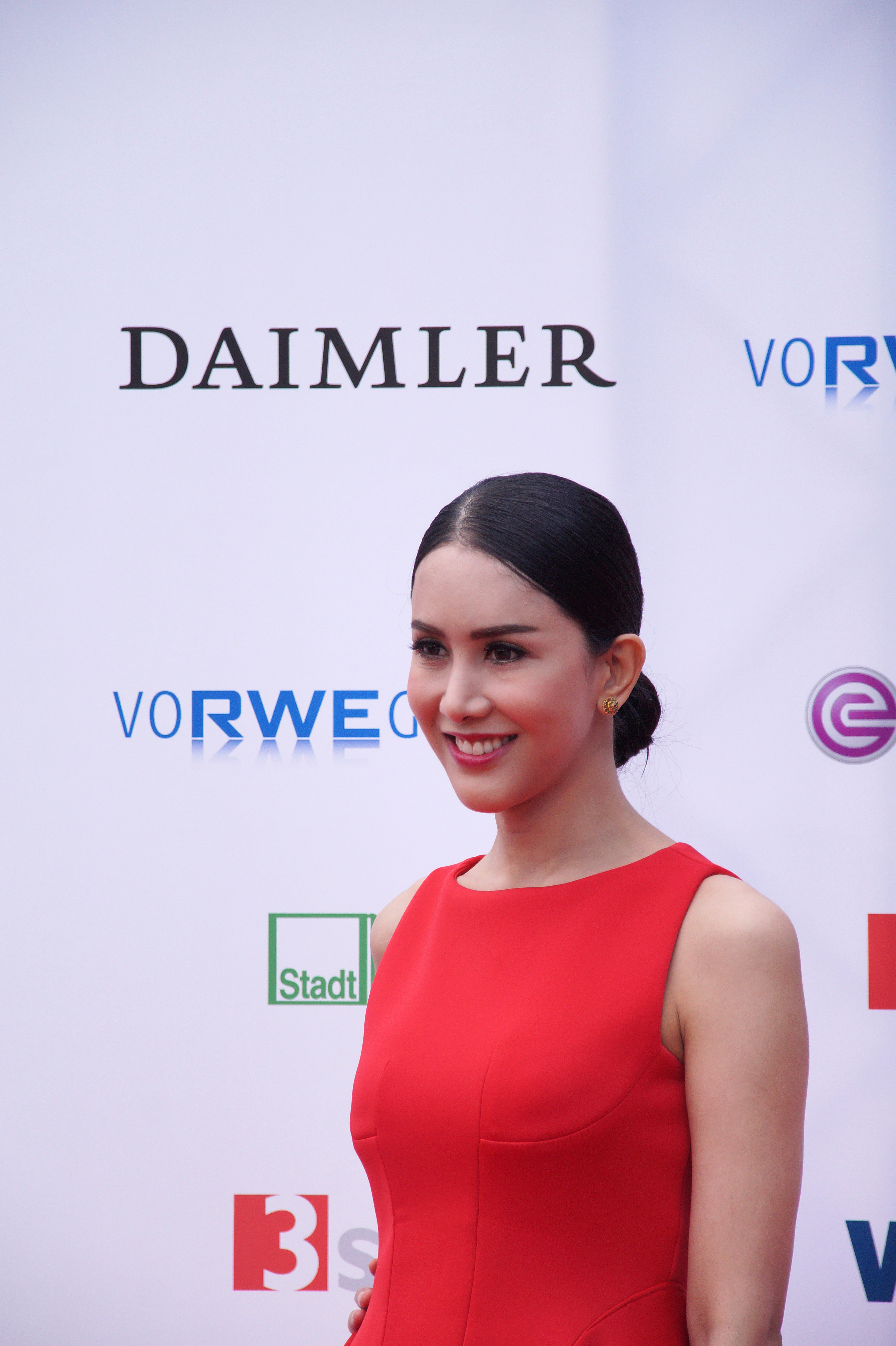 Aisawanya Areyawattana bei der Verleihung des 'Grimme Preis 2016' am 08.04.2016 in Marl.